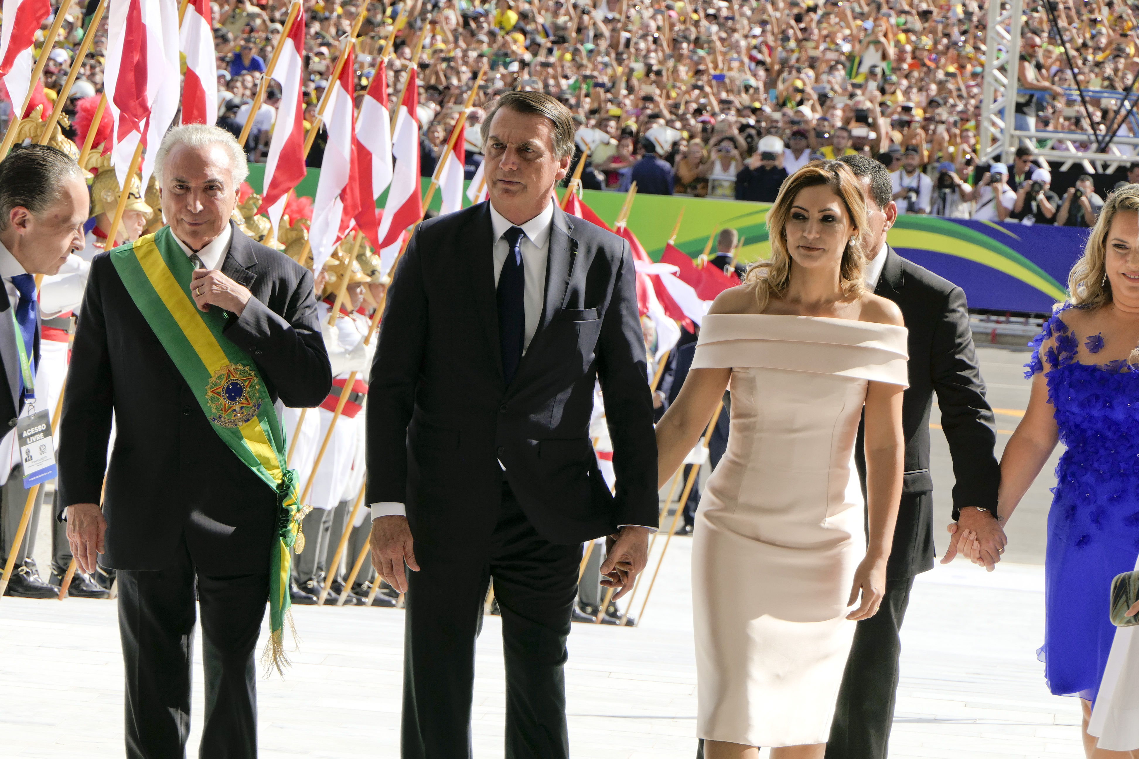 Solenidade de posse do presidente da República e do vice-presidente eleitos. Michel Temer e sua esposa, Marcela Temer aguardam o presidente da República para transmitir a faixa presidencial. Foto: Roque de Sá/Agência Senado